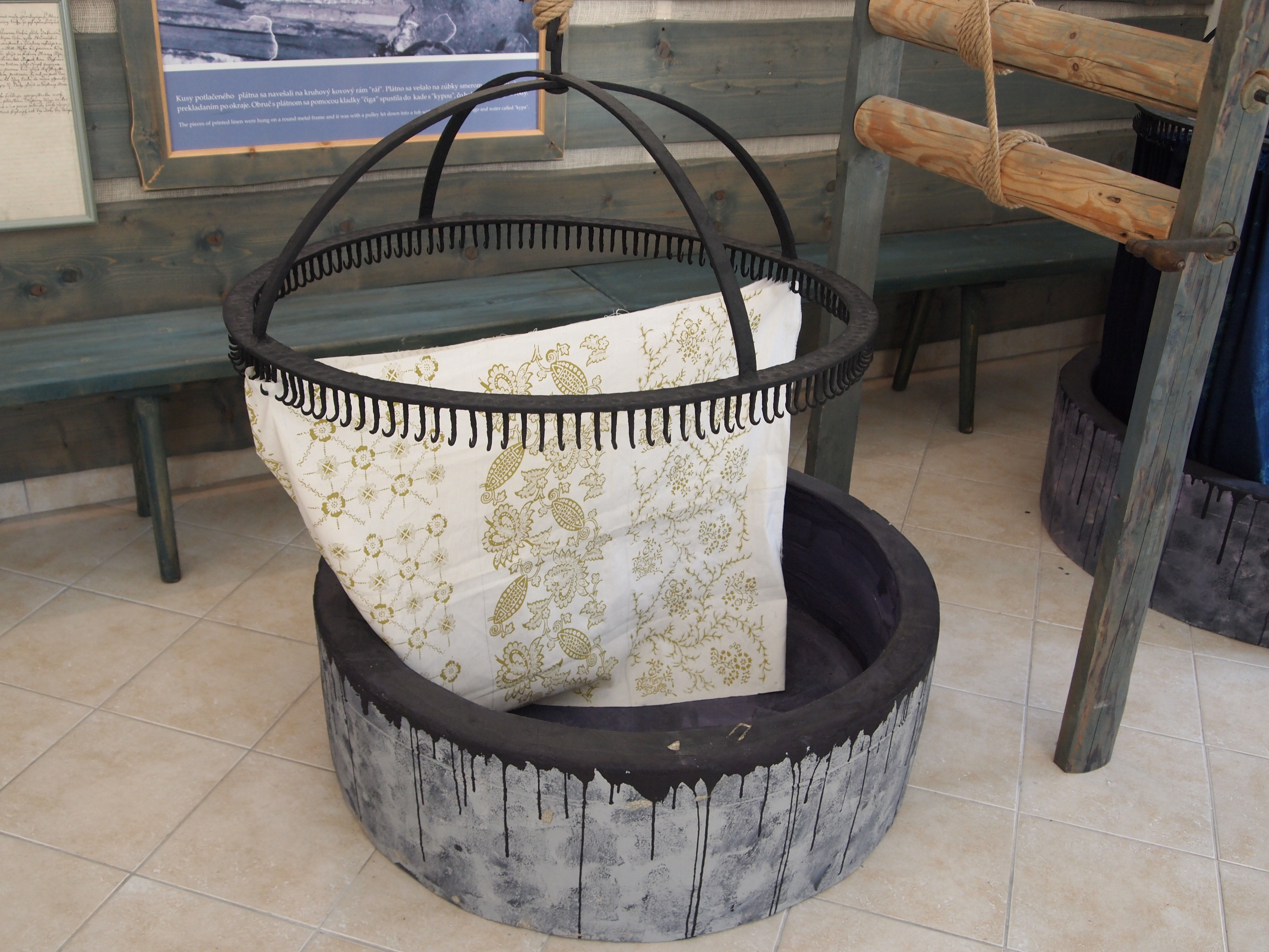 Výroba modrotlače, Múzeum Liptovský Hrádok, Slovensko